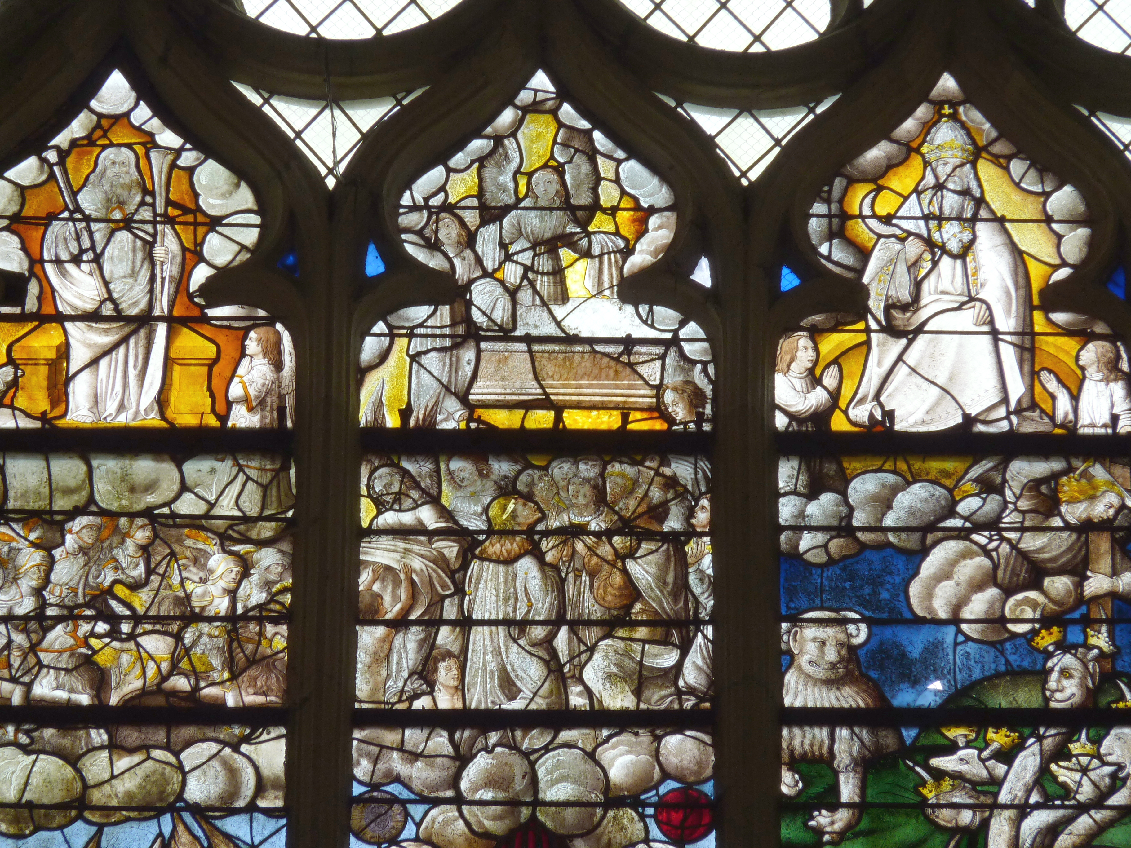 Katholische Kirche Saint-Georges in Chavanges im Département Aube (Champagne-Ardenne/Frankreich), Bleiglasfenster aus dem 16. Jahrhundert, Darstellung: Apokalypse, oberer Ausschnitt.